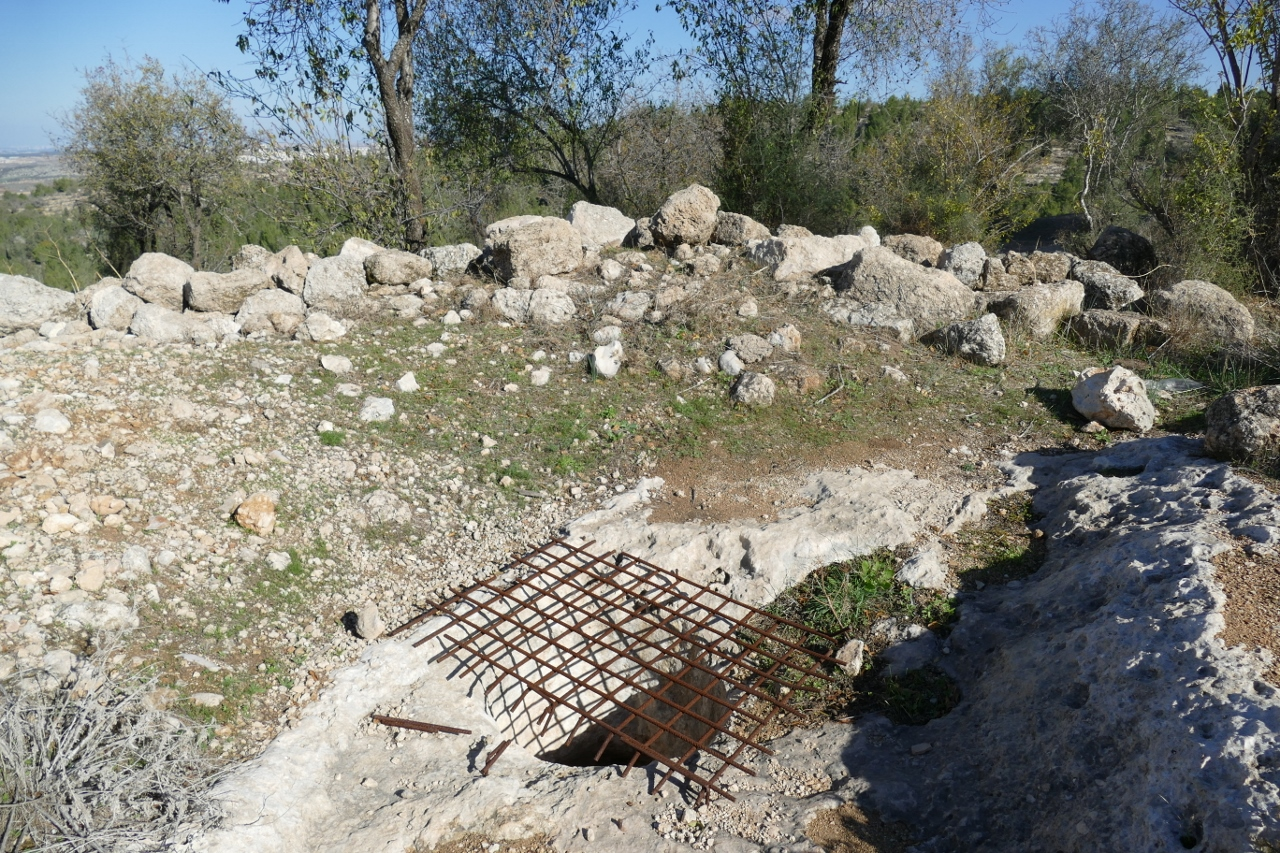 Horvat Eqed